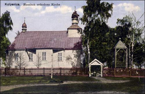 Царква на германскай паштоўцы (1915-1918)